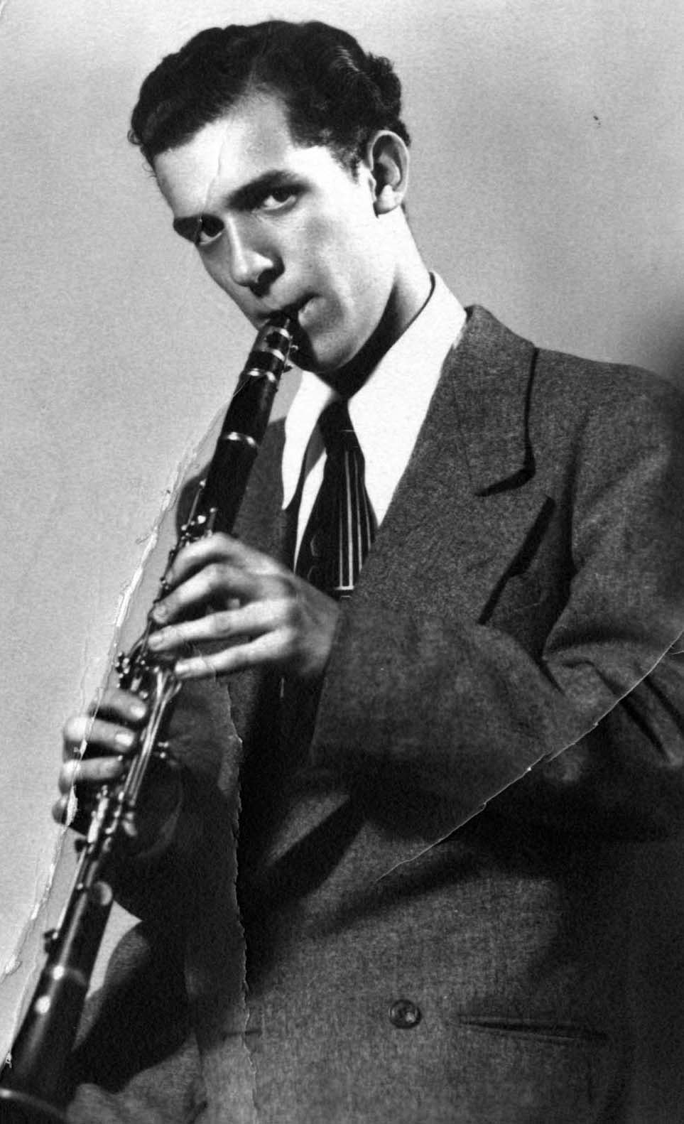 Photographie de Serge Garant avec une clarinette.